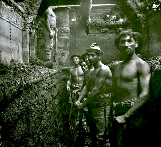 Interior de las faenas en Chile a principios del siglo XX. Imagen extraída del libro La masacre de la escuela Santa María de Iquique